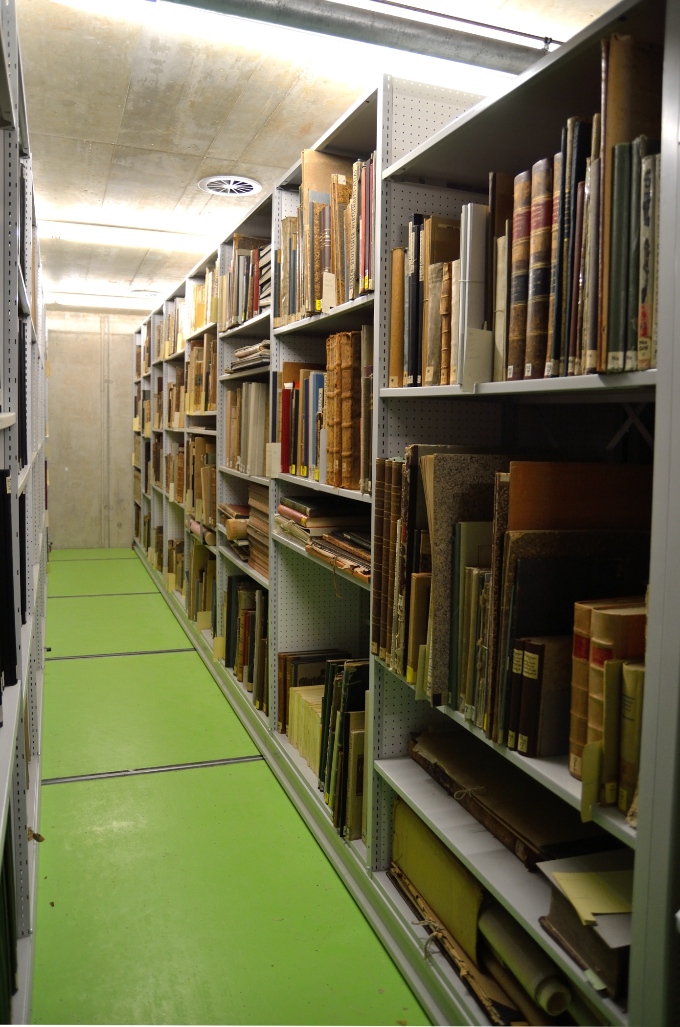 Magazin II der Lippischen Landesbibliothek beim Tag des offenen Magazins 2013